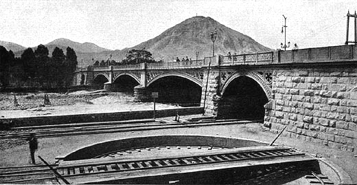 El Puente Balta o Puente de Fierro, puente ubicado en Lima. Es el primer puente de fierro construido en la capital, cruza el río Rímac uniendo el cercado de Lima con el distrito del Rímac.